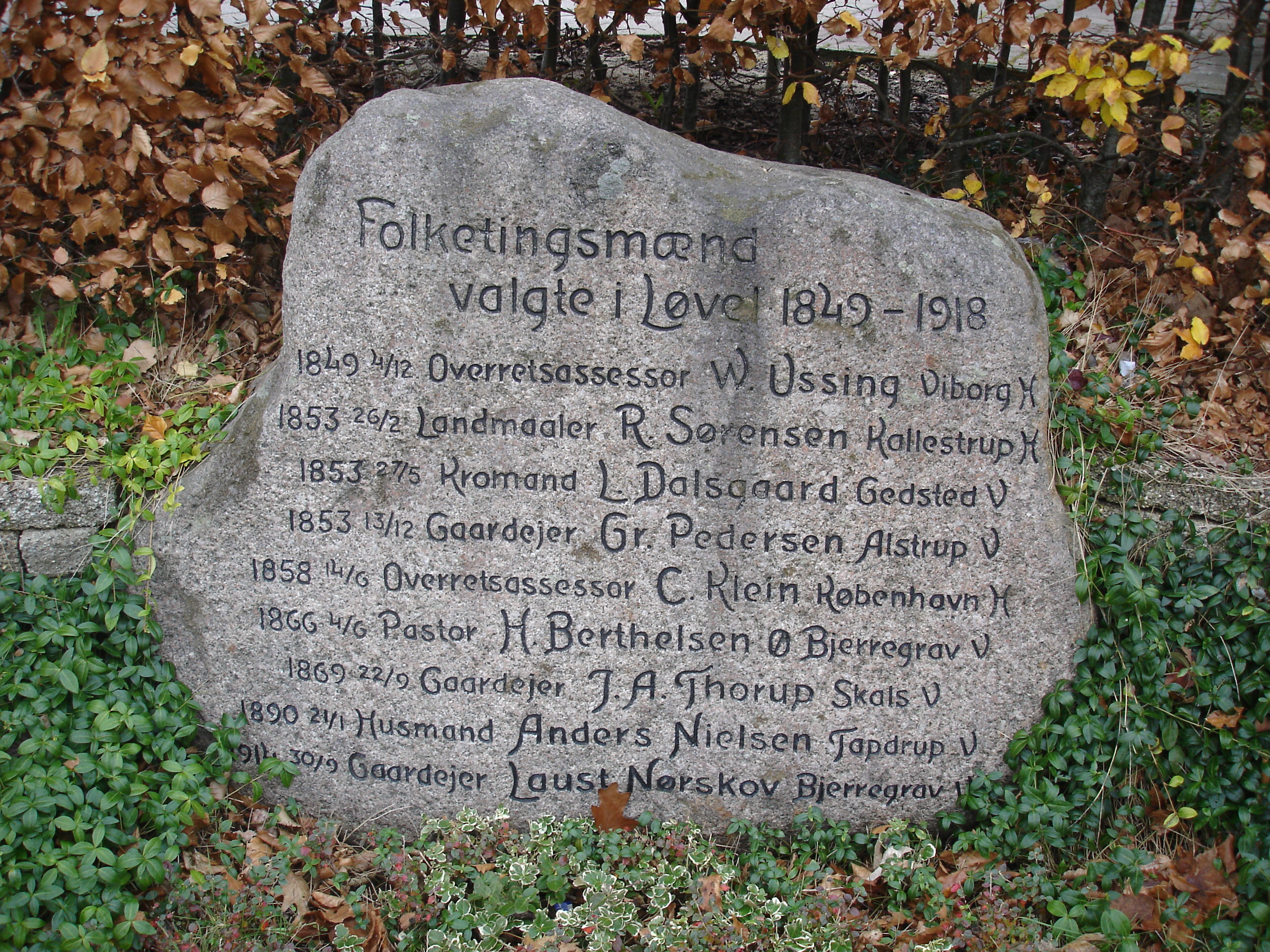 Mindesten over Løvelkredsens folketingsmænd i Løvel Mindelund